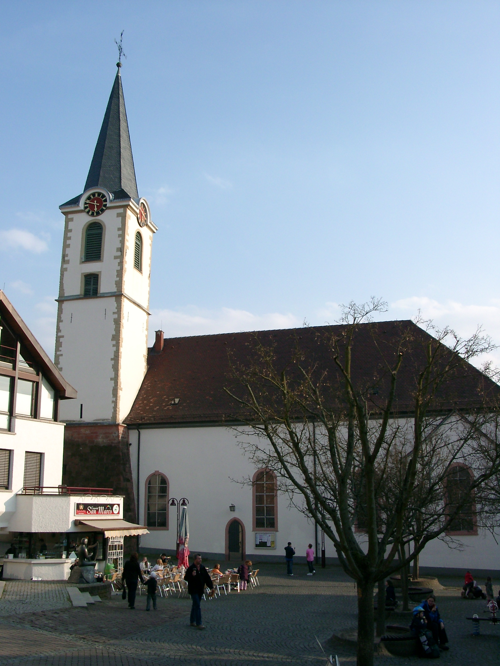 Wiesloch, Stadtkirche der Evangelischen Johannesgemeinde